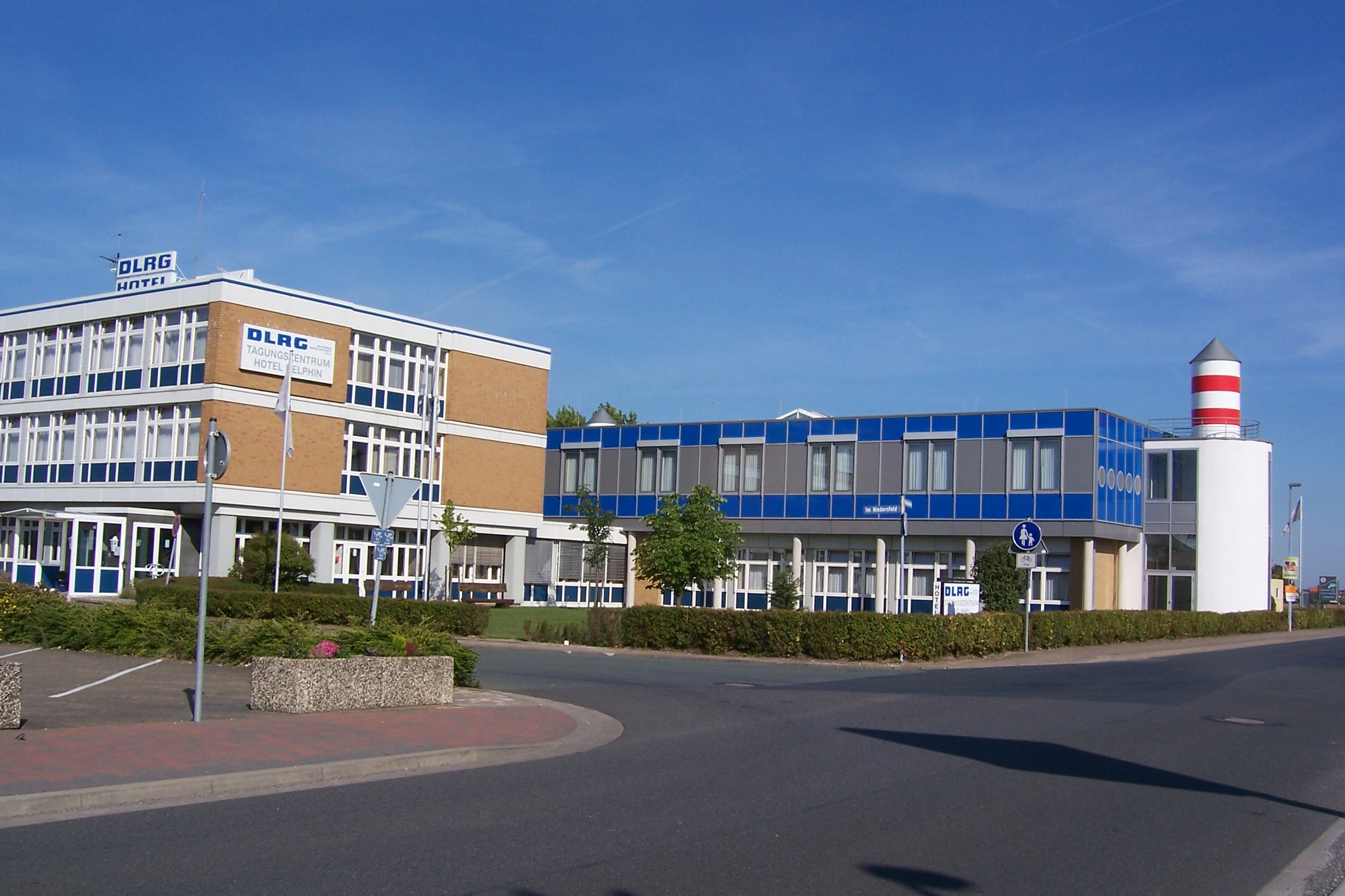 Bundesgeschäftsstelle der DLRG in Bad Nenndorf (rechts) mit dem Tagungshotel Delphin (links)